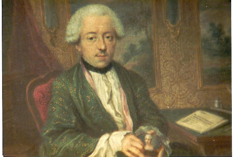 Karel, 2de hertog d'Ursel